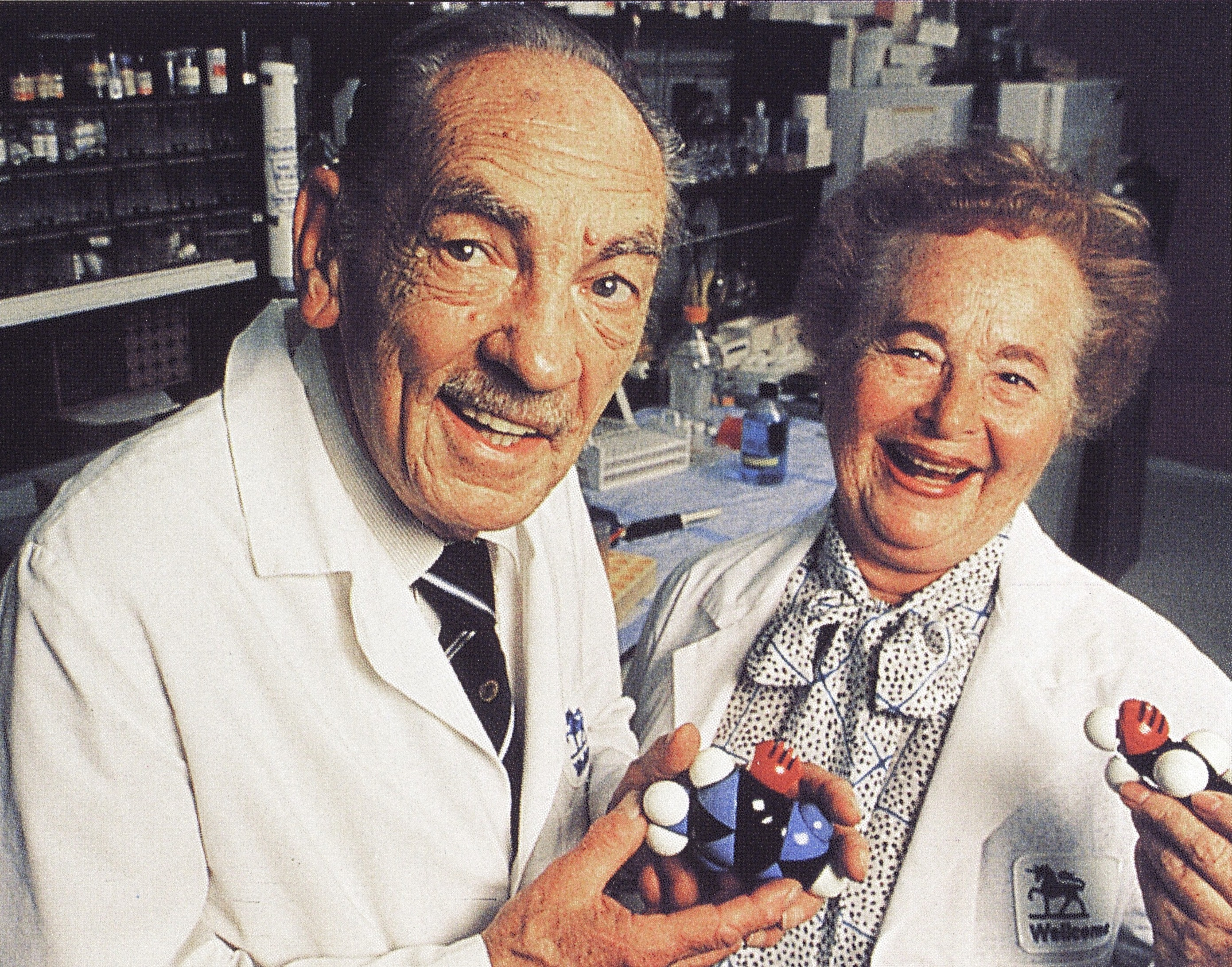 Nobel Prize winners, Dr Hitchings and Dr Elion